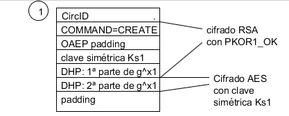 Celula create en Intercambio de células para el establecimiento de circuito en Tor